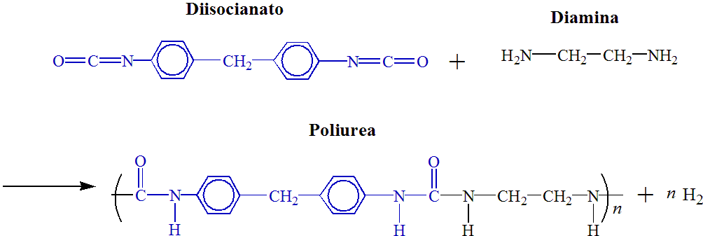 Reacción general de una poliurea